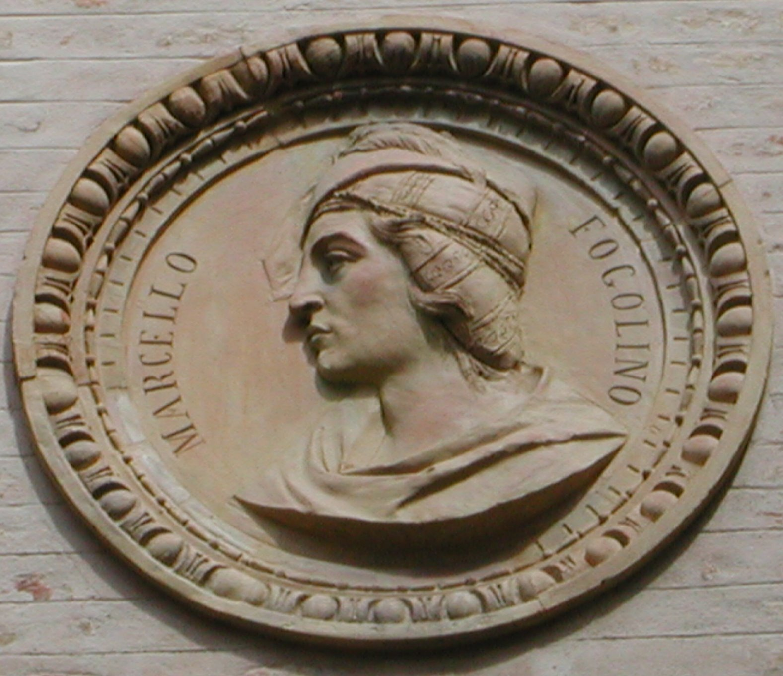 Ritratto di Marcello Fogolino (pittore rinascimentale di Vicenza) al Palazzo Thiene a Vicenza